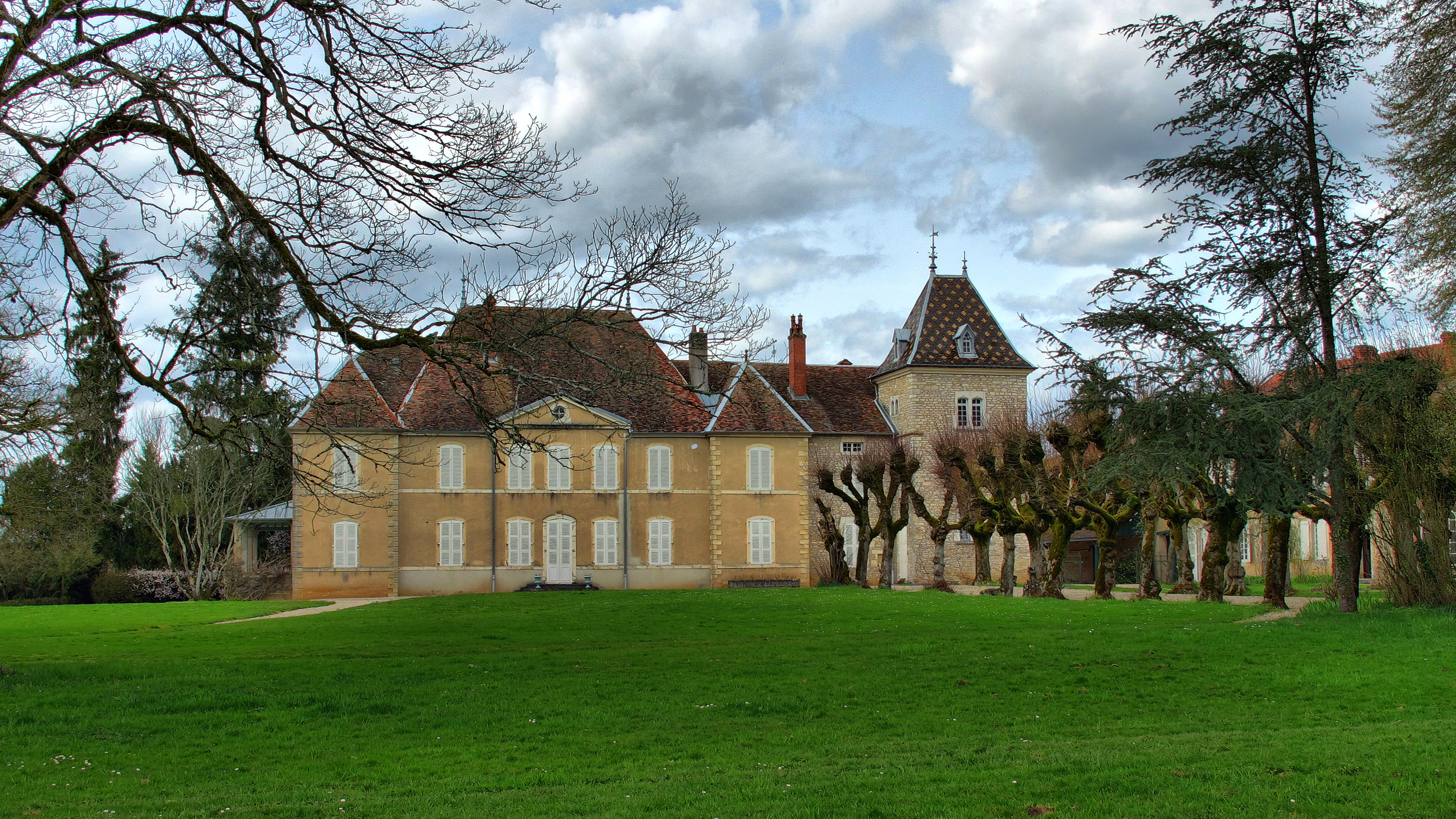 Inscrit aux monuments historiques sous le numéro PA70000055